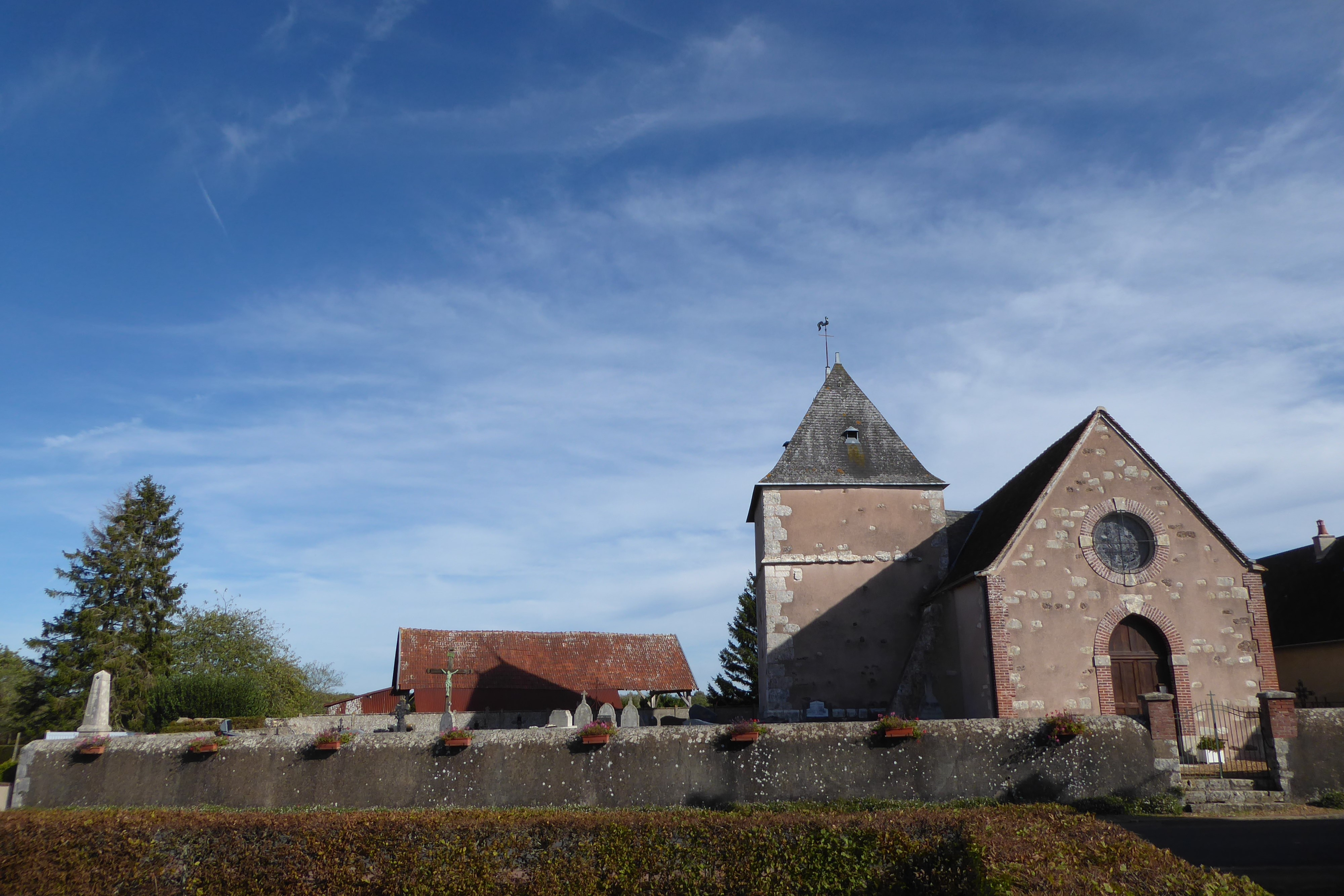 église Saint-Vrain de Montharville, Eure-et-Loir, France.